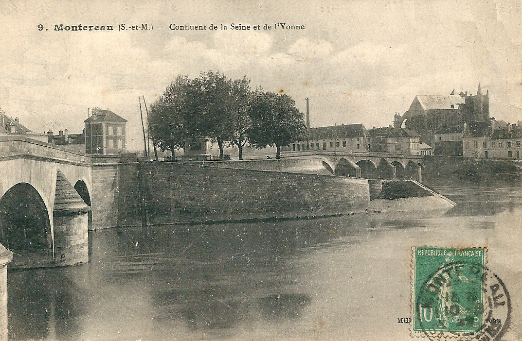 Montereau-Fault-Yonne (Seine-et-Marne) - Le confluent de la Seine & de l'Yonne - vers 1920